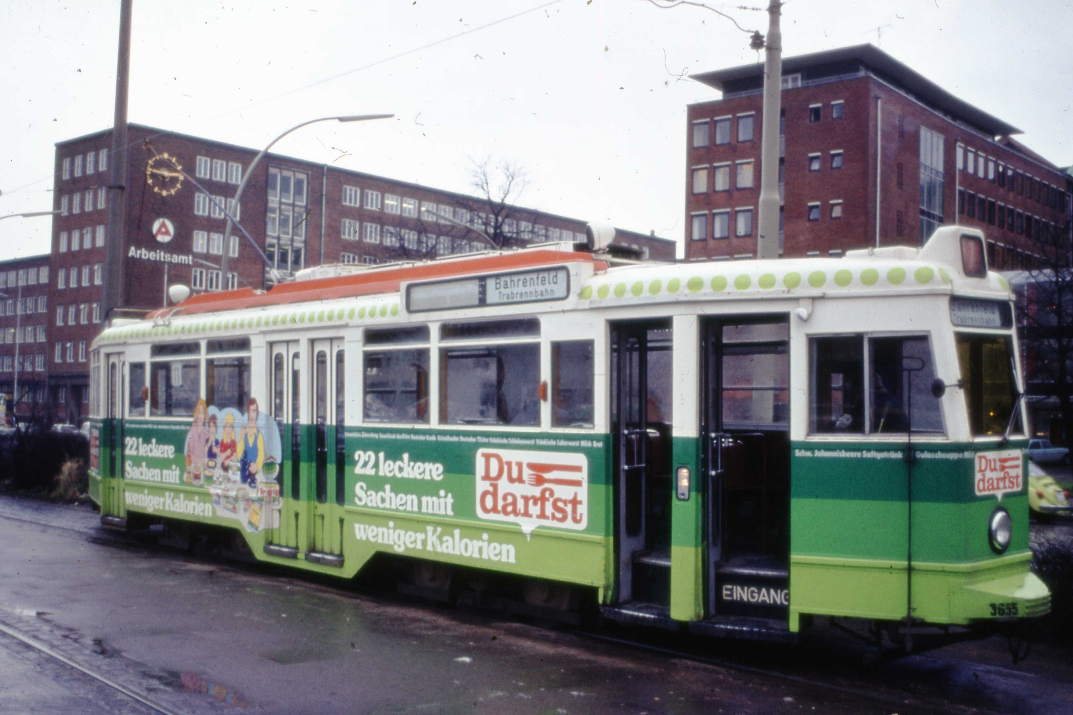 Straßenbahn der Linie 11 in der Kurt-Schumacher-Allee vor dem Arbeitsamt.